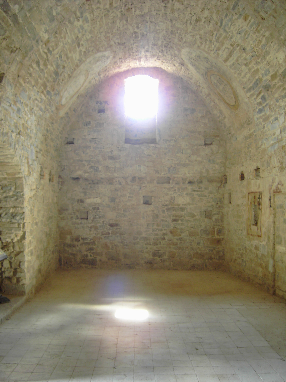 El interior de la antigua iglesia de Moriello de Sant Pietro, en el Sobrarbe, Provincia de Huesca, España.